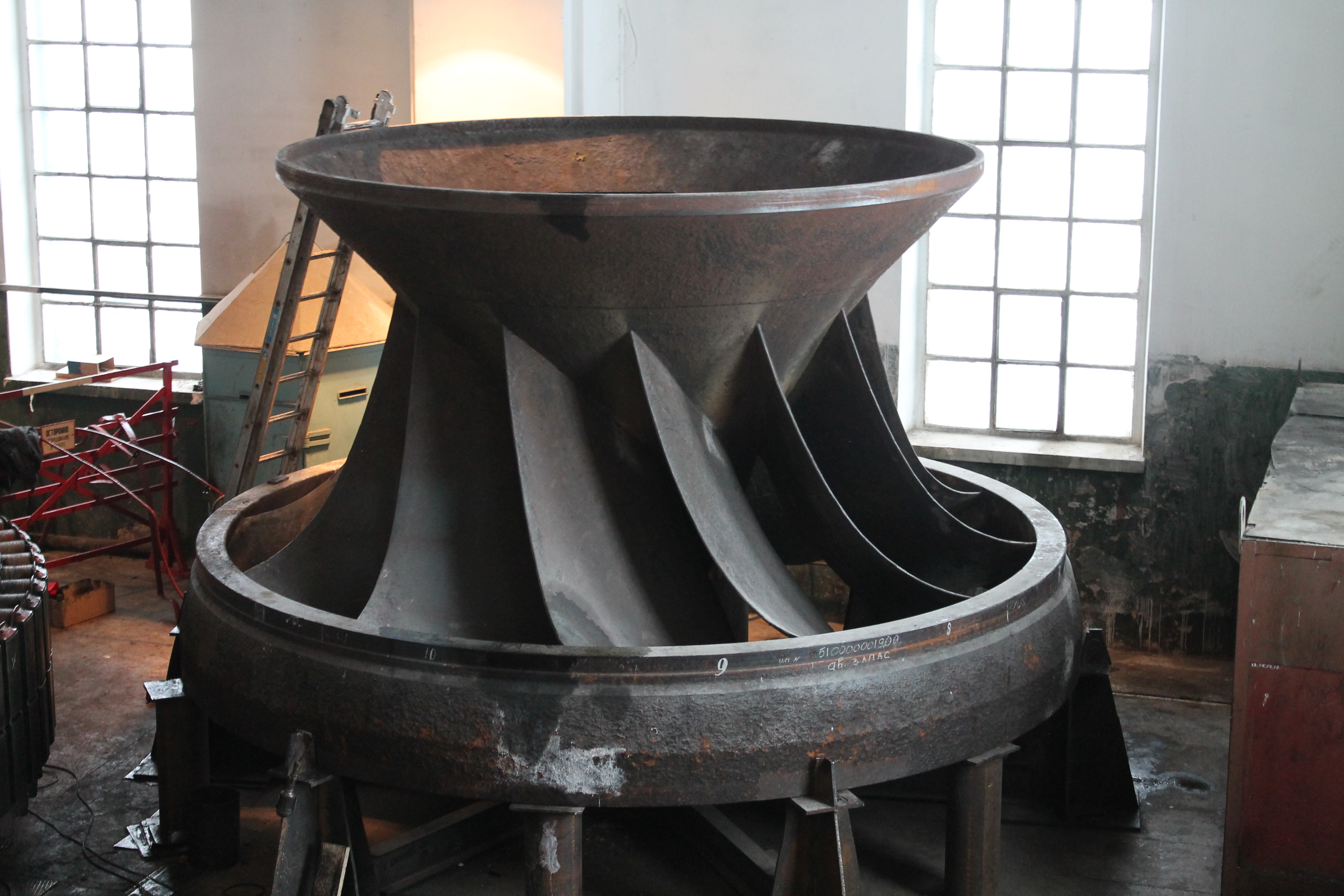 Волховская ГЭС